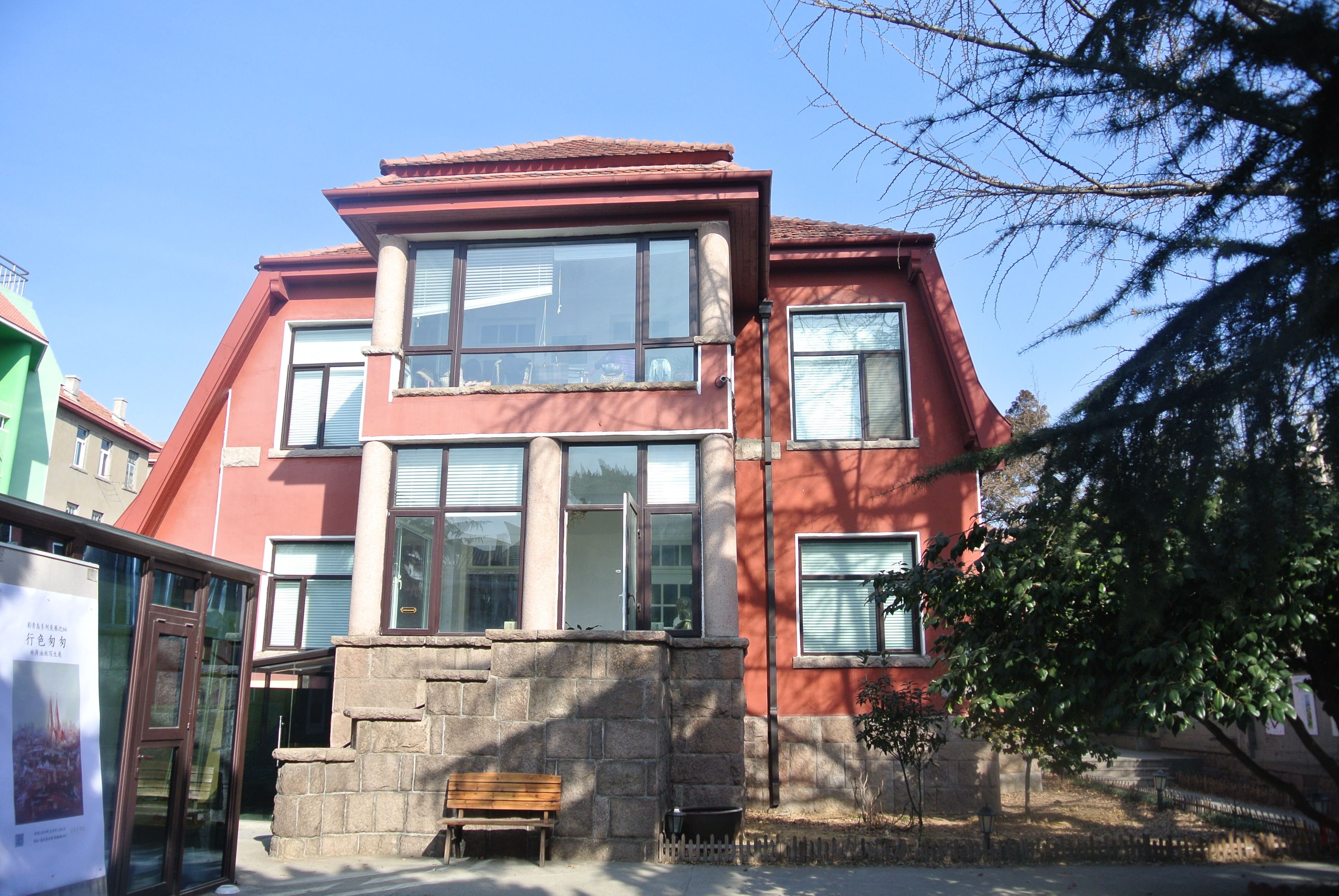 青岛安徽路16号南立面